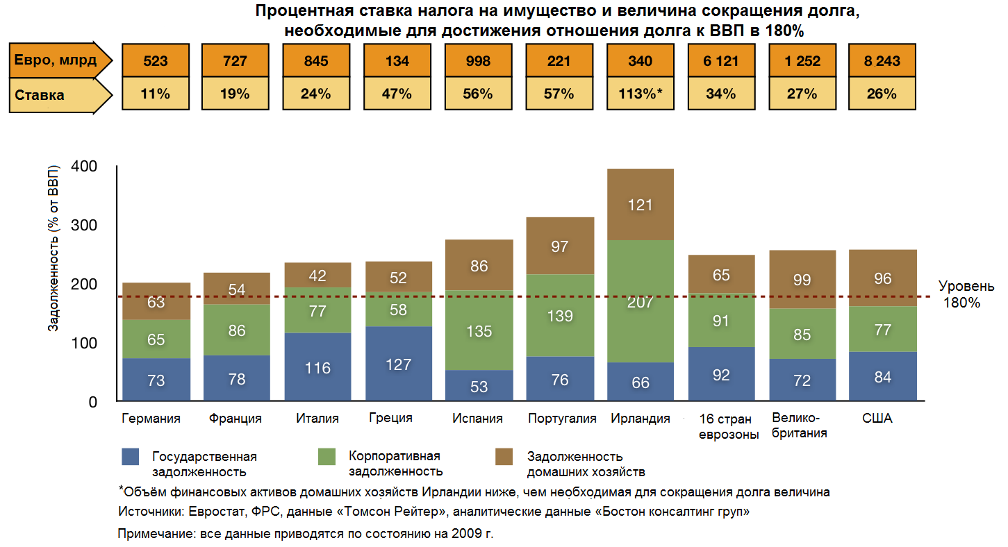 Величина, на которую должен сократиться объём госдолга ряда стран еврозоны, Великобритании и США для того, чтобы эти страны могли выполнять свои обязательства. На графике показан текущий уровень задолженности частного, государственного и корпоративного секторов, величина, на которую он должен сократиться и ставка единовременного налога на имущество, необходимого, чтобы снизить общую сумму задолженности стран до 180% ВВП. Источник: данные Бостноской консалтинговой группы, (23 сентября 2011).